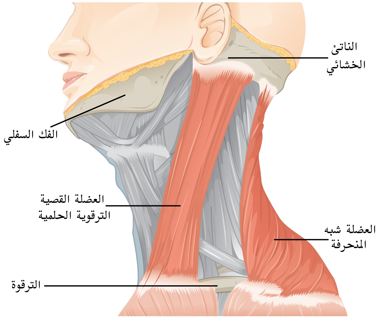 رسم تخطيطي للعضلات التي يتحكم بها العصب الإضافي